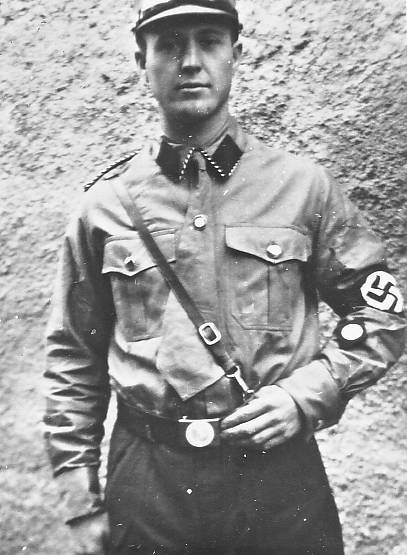 NSKK-Mitglied